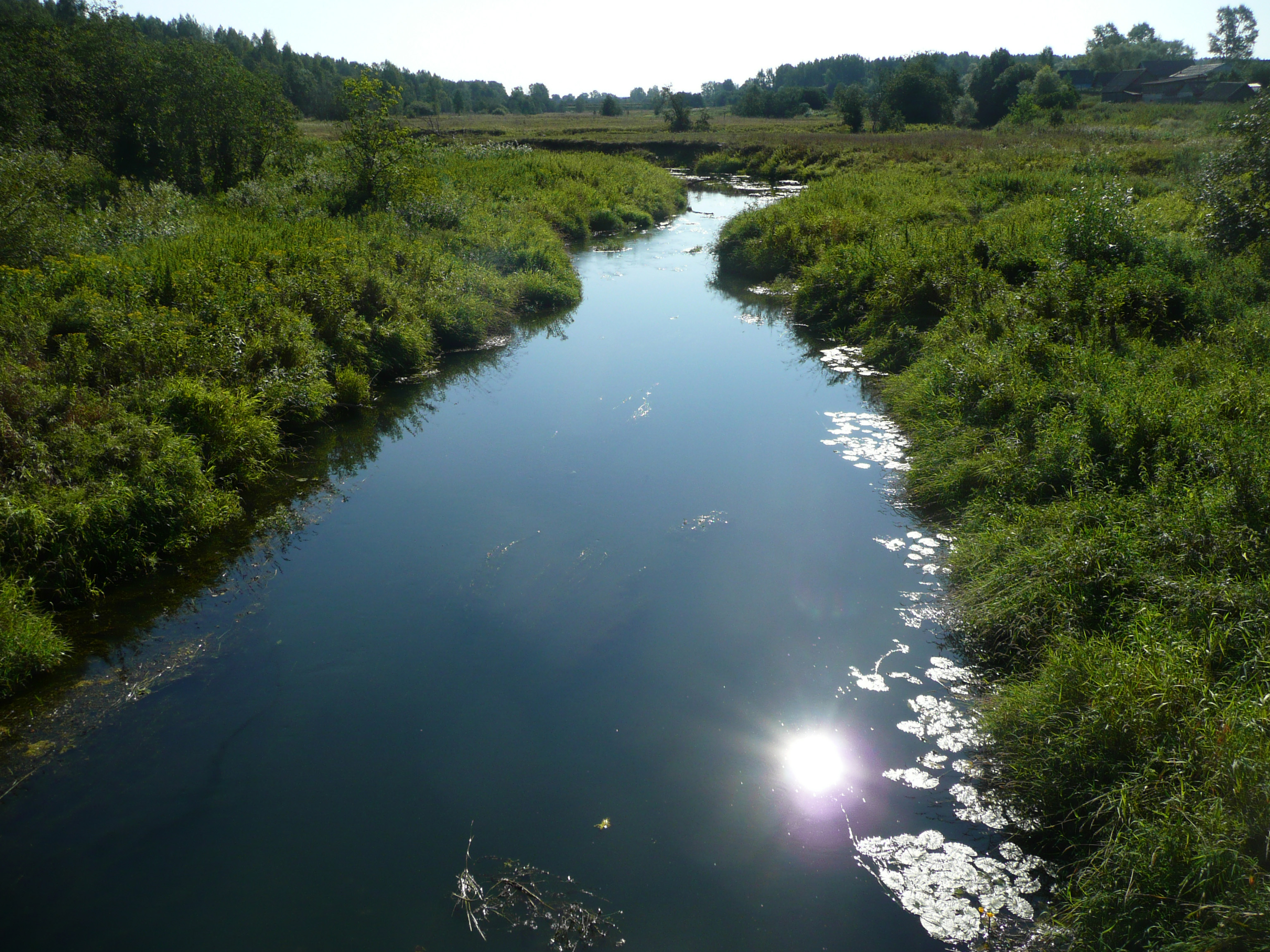 Река Рачайня в Булатниково